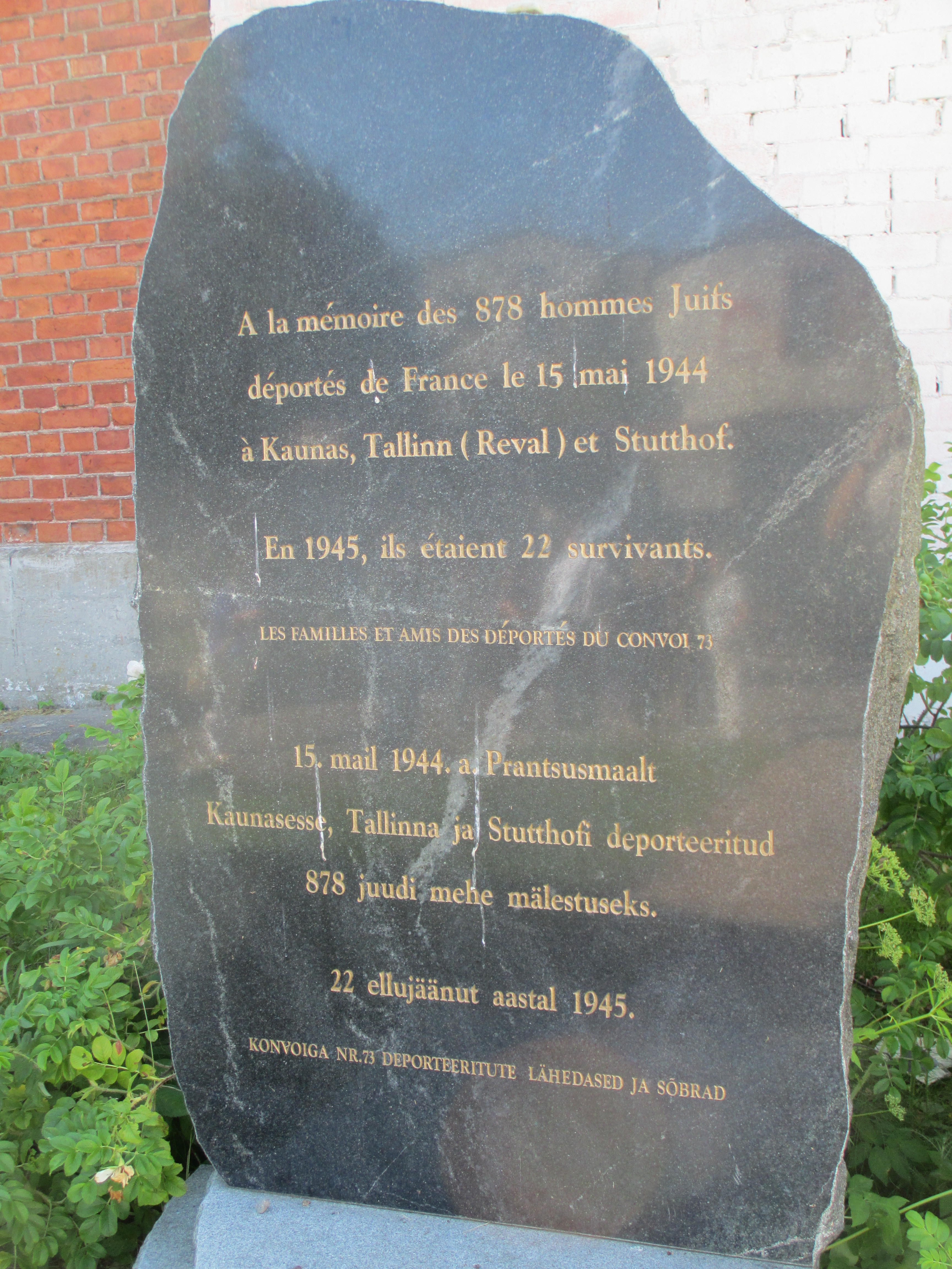 אבן זיכרון בטאלין לנספי משלוח 73 מדראנסי